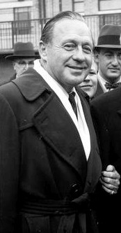 Entertainer Jack Benny, 1958